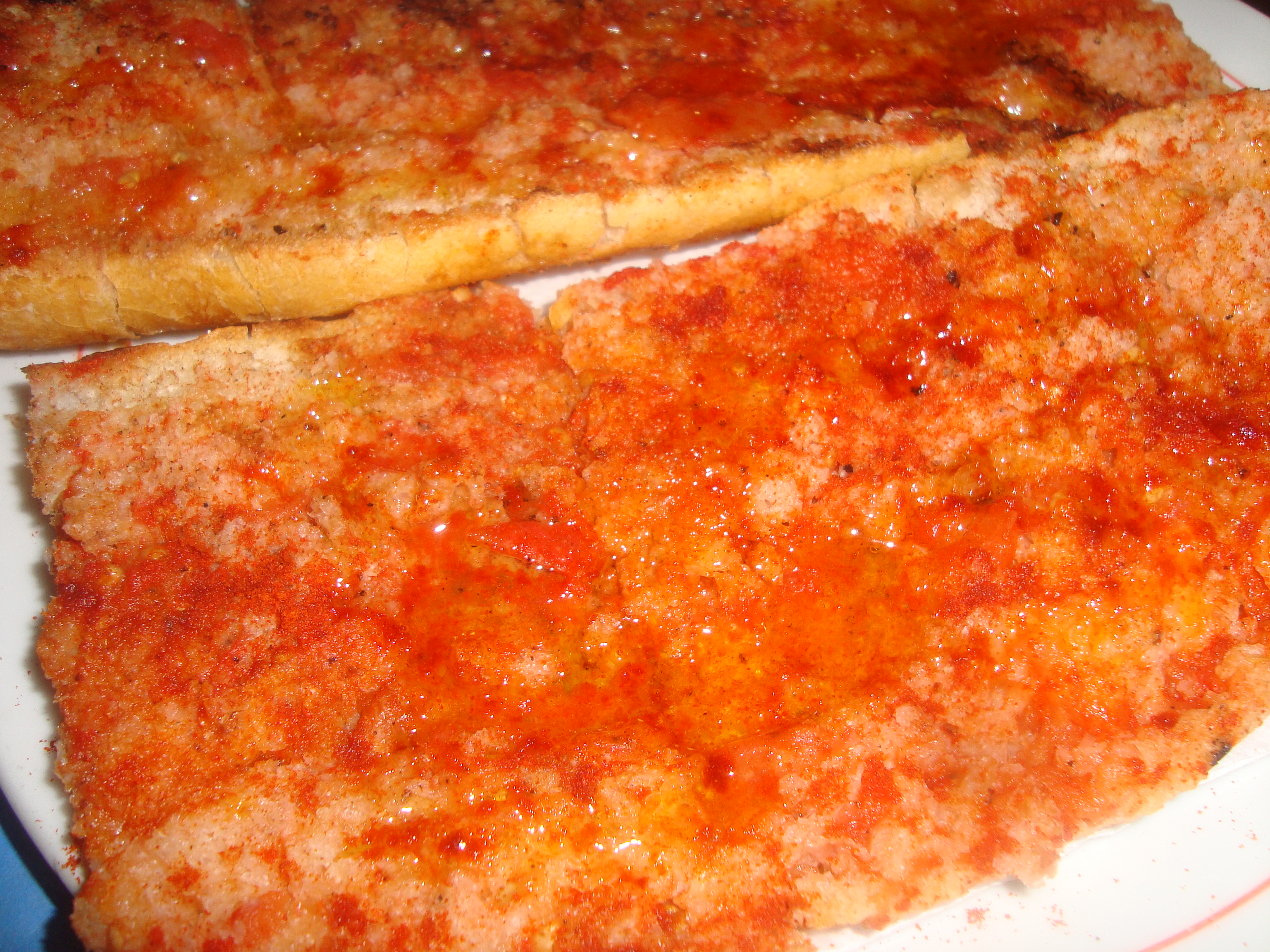 Típico pan con tomate (La Barona, Castellón)